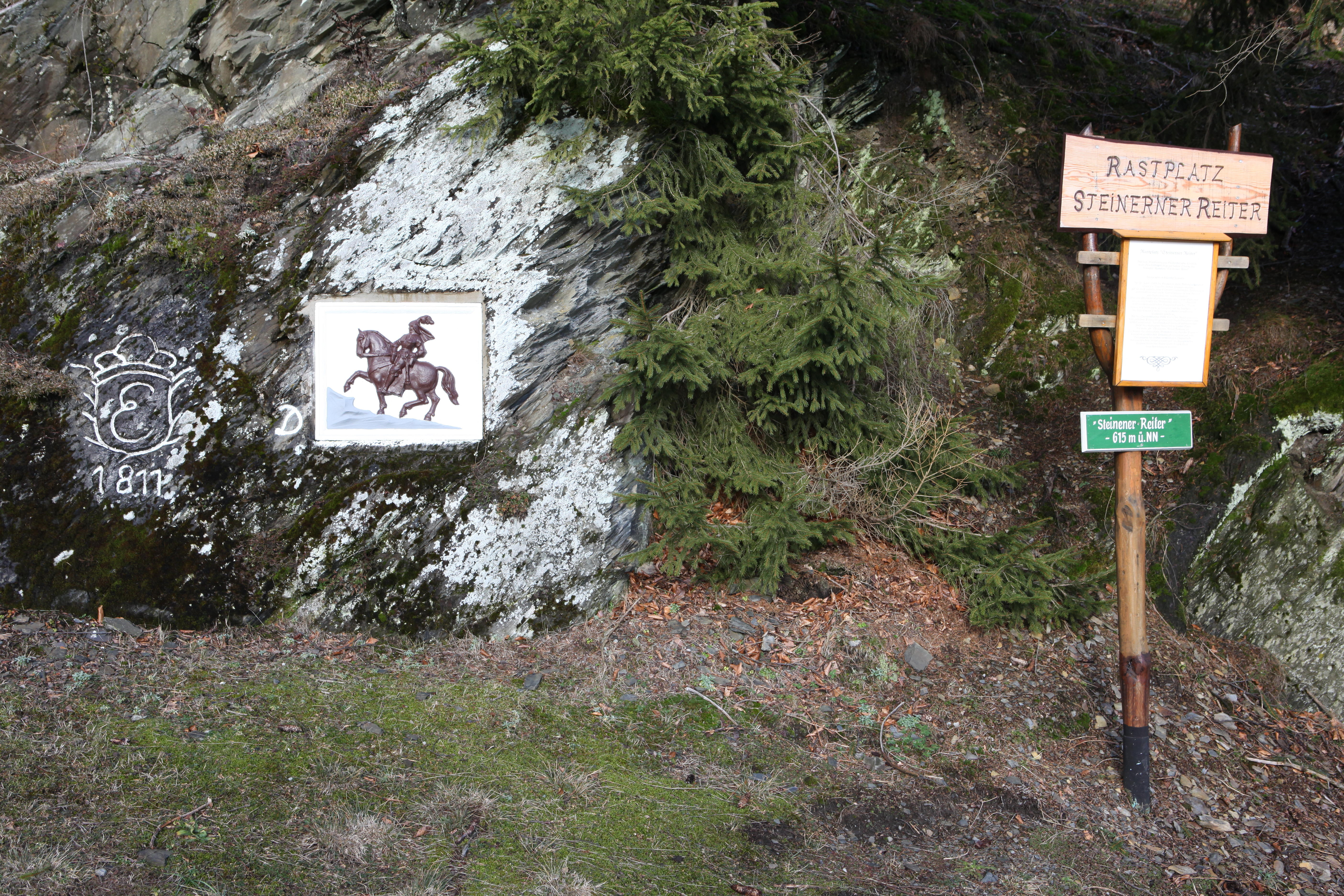 Steinerer Reiter bei Creunitz, Gräfenthal